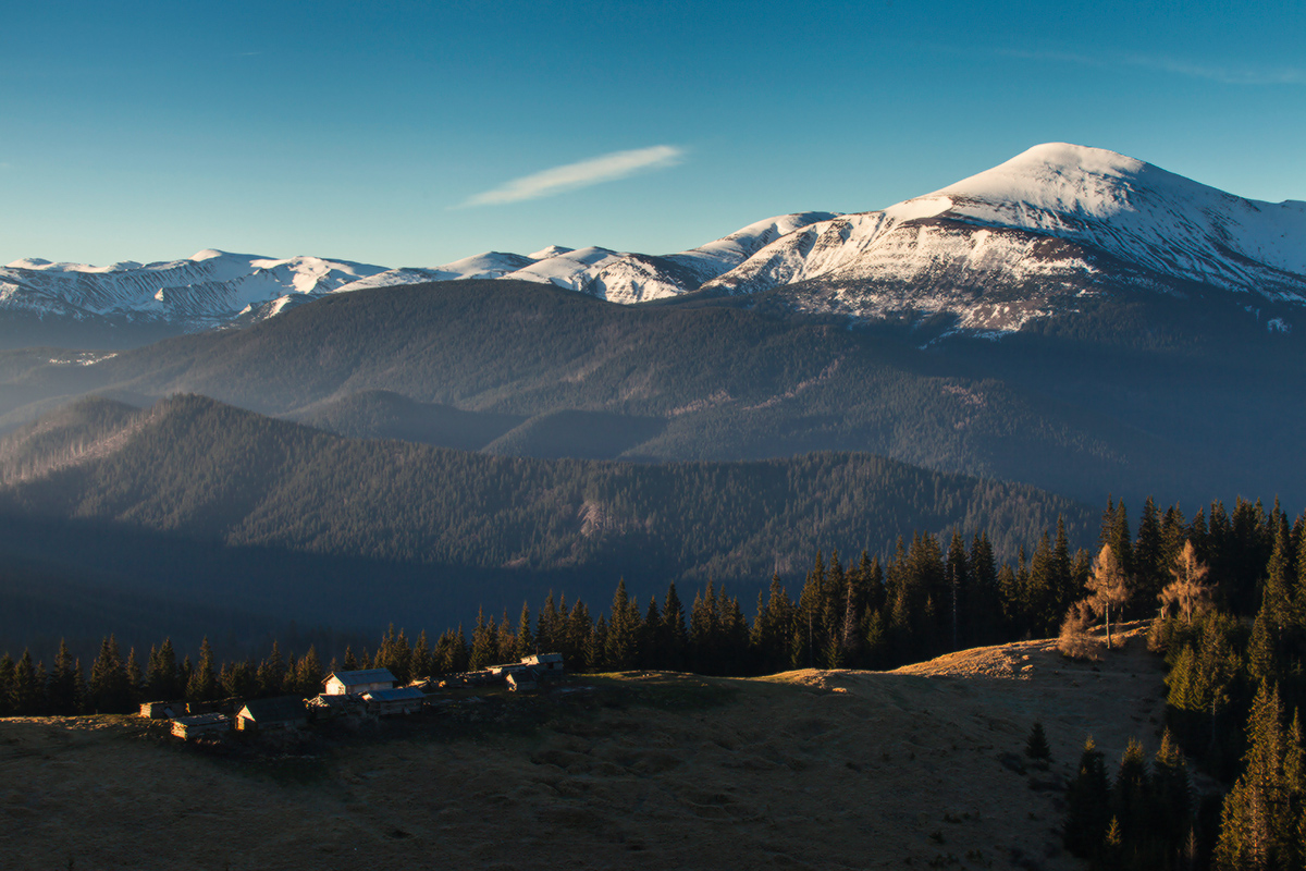 Карпатський, Яремчанська міська рада, Верховинський район, Надвірнянський район